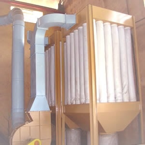 Foto de um filtro de manga montado. Composto por um ventilador, duto de condução de ar, o porta-filtro e as mangas.